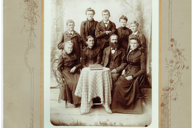 Frieda Hauswirth vorne links im Kreis ihrer Familie